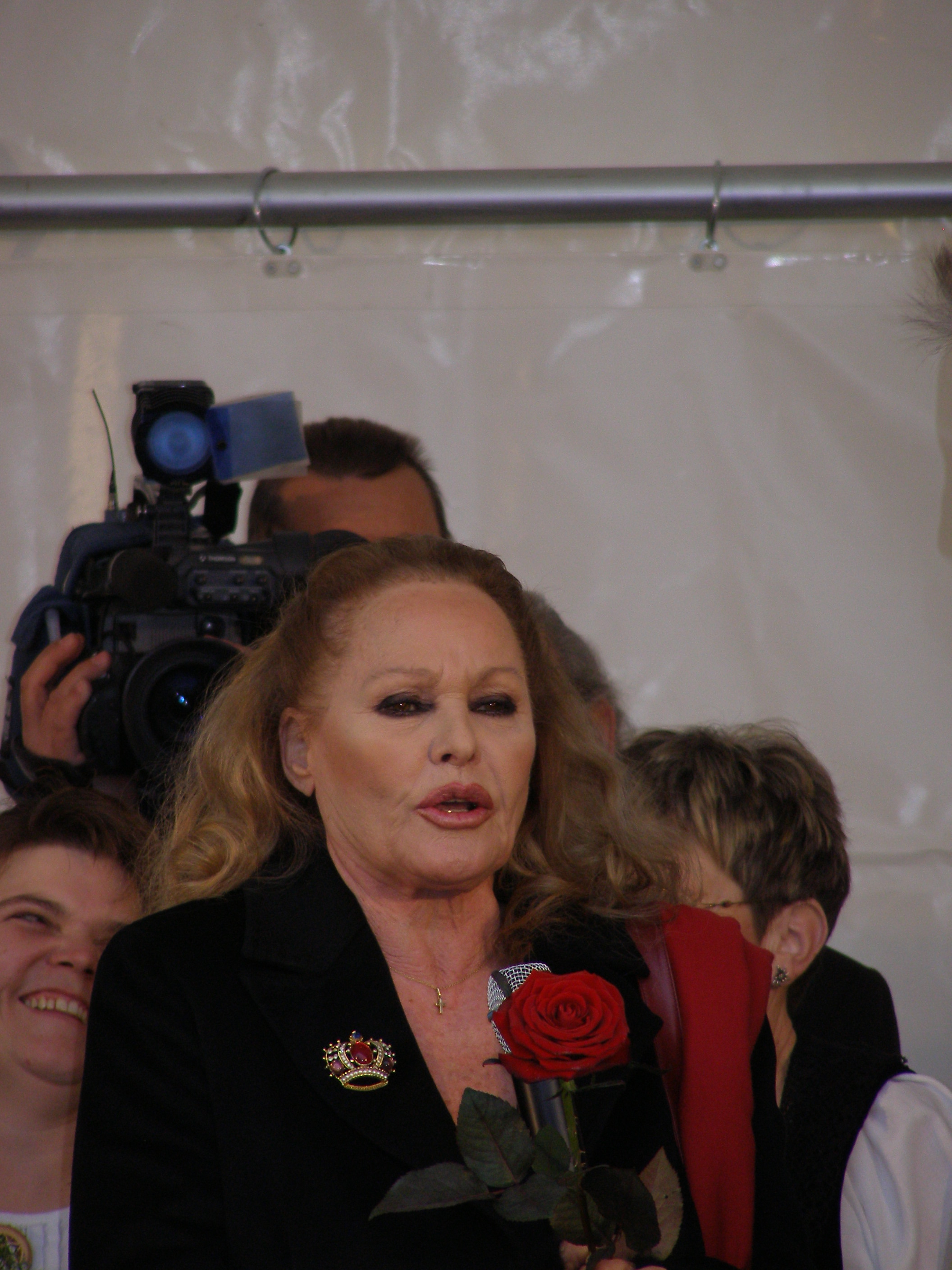 Ursula Andress in her Hometown in Ostermundigen, Switzerland